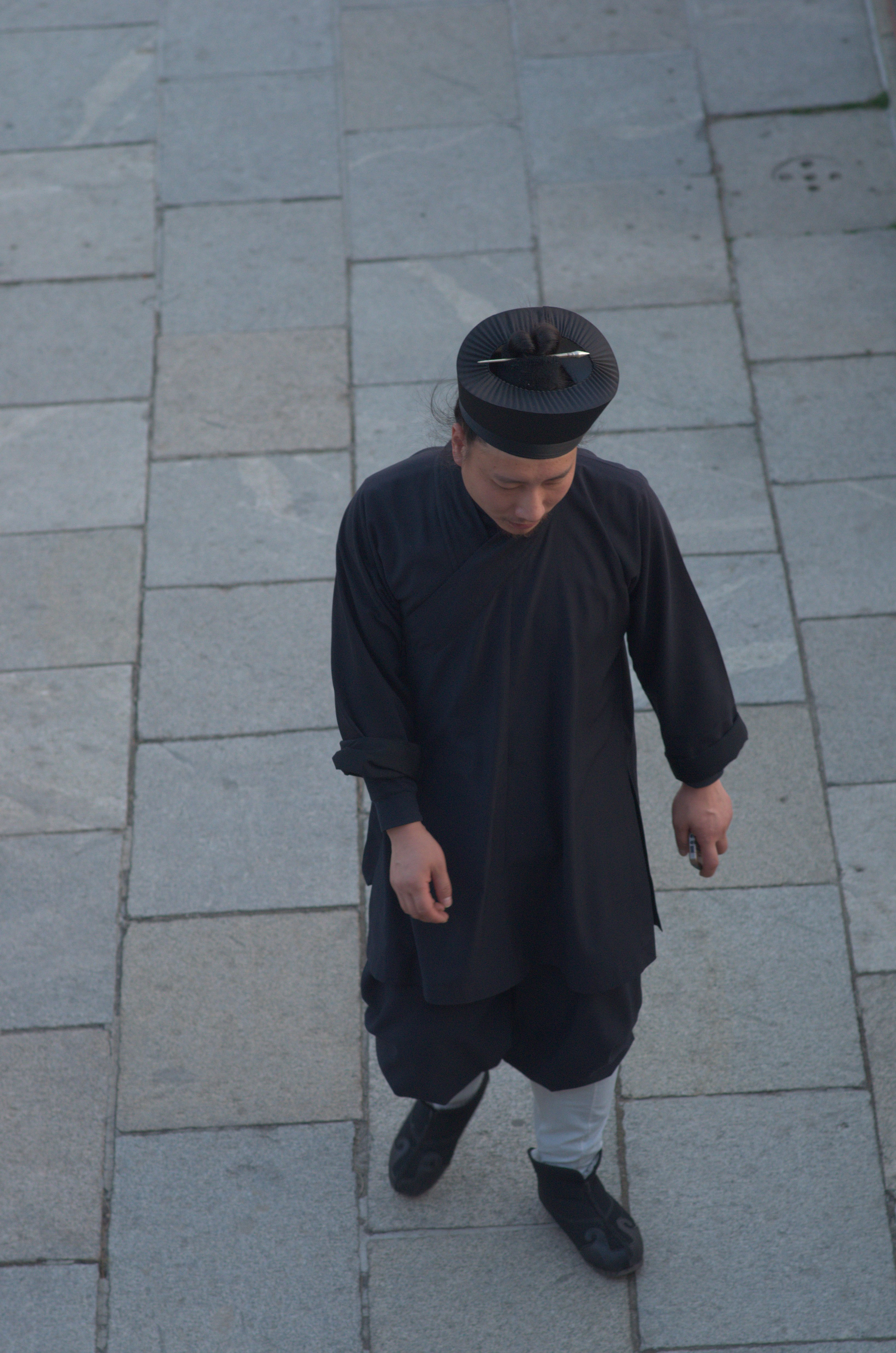 Moine taoïsmetaoïste à Taishan